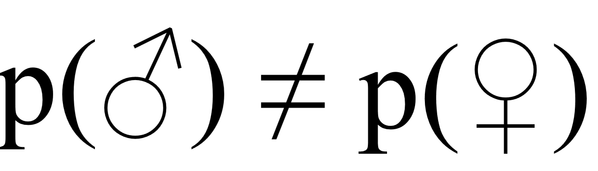 Symbool voor de ongelijke kansen op grond van gender